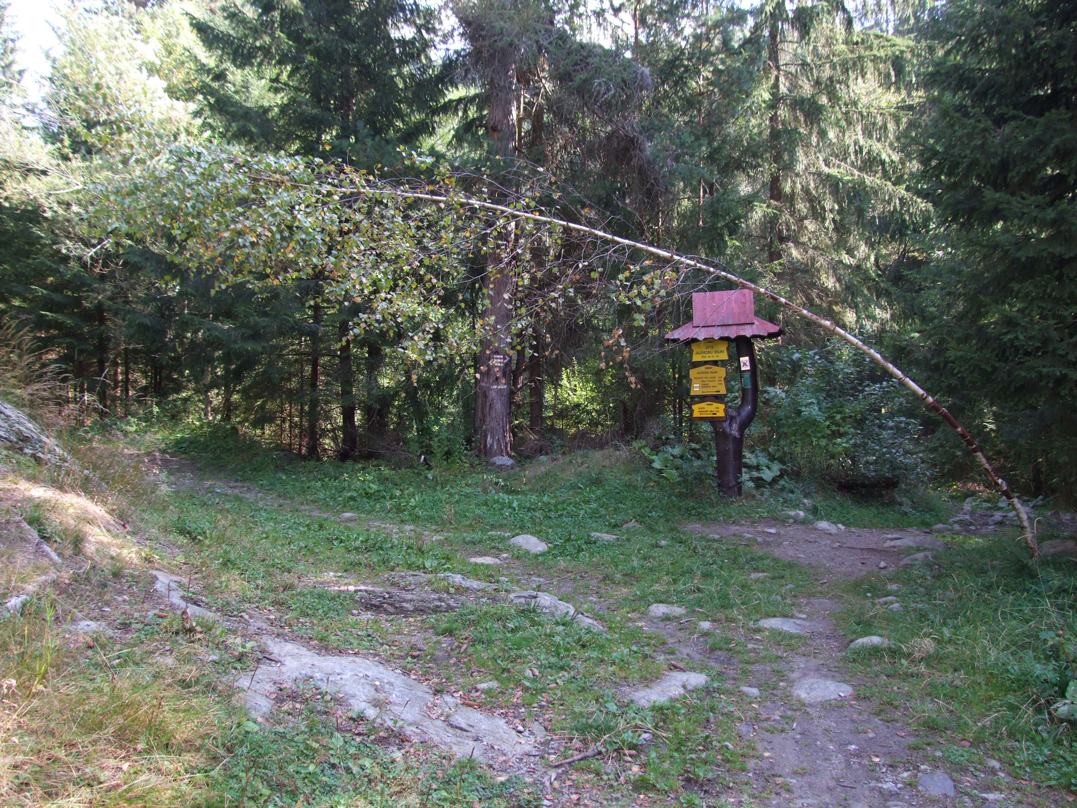 Rozdroże szlaków turystycznych na Przesiece w Dolinie Jałowieckiej